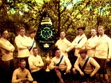 Vitesse kampioen van Oosten 1896, blauw diagonale baan